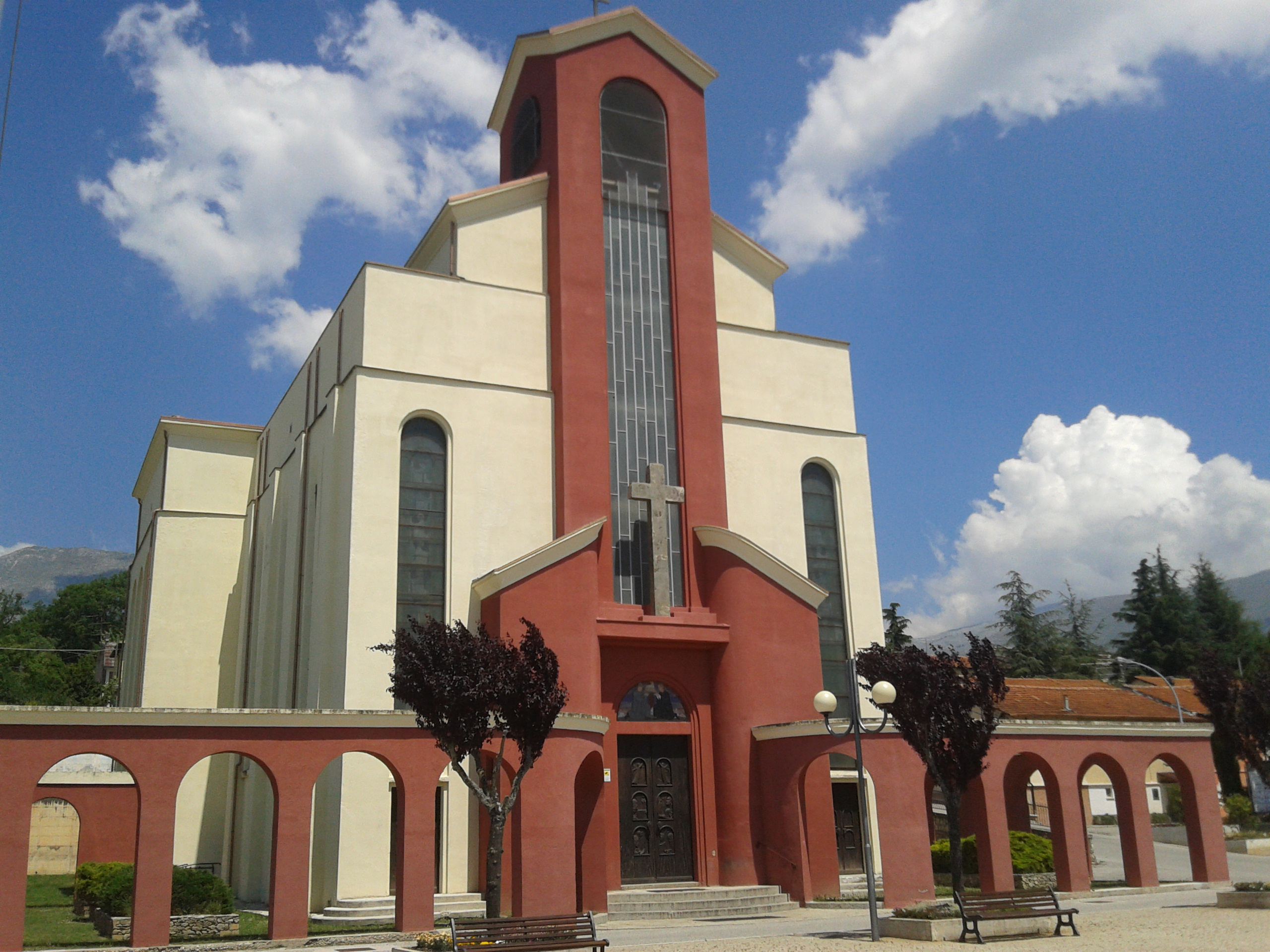 Chiesa di San Giuseppe ad Aielli